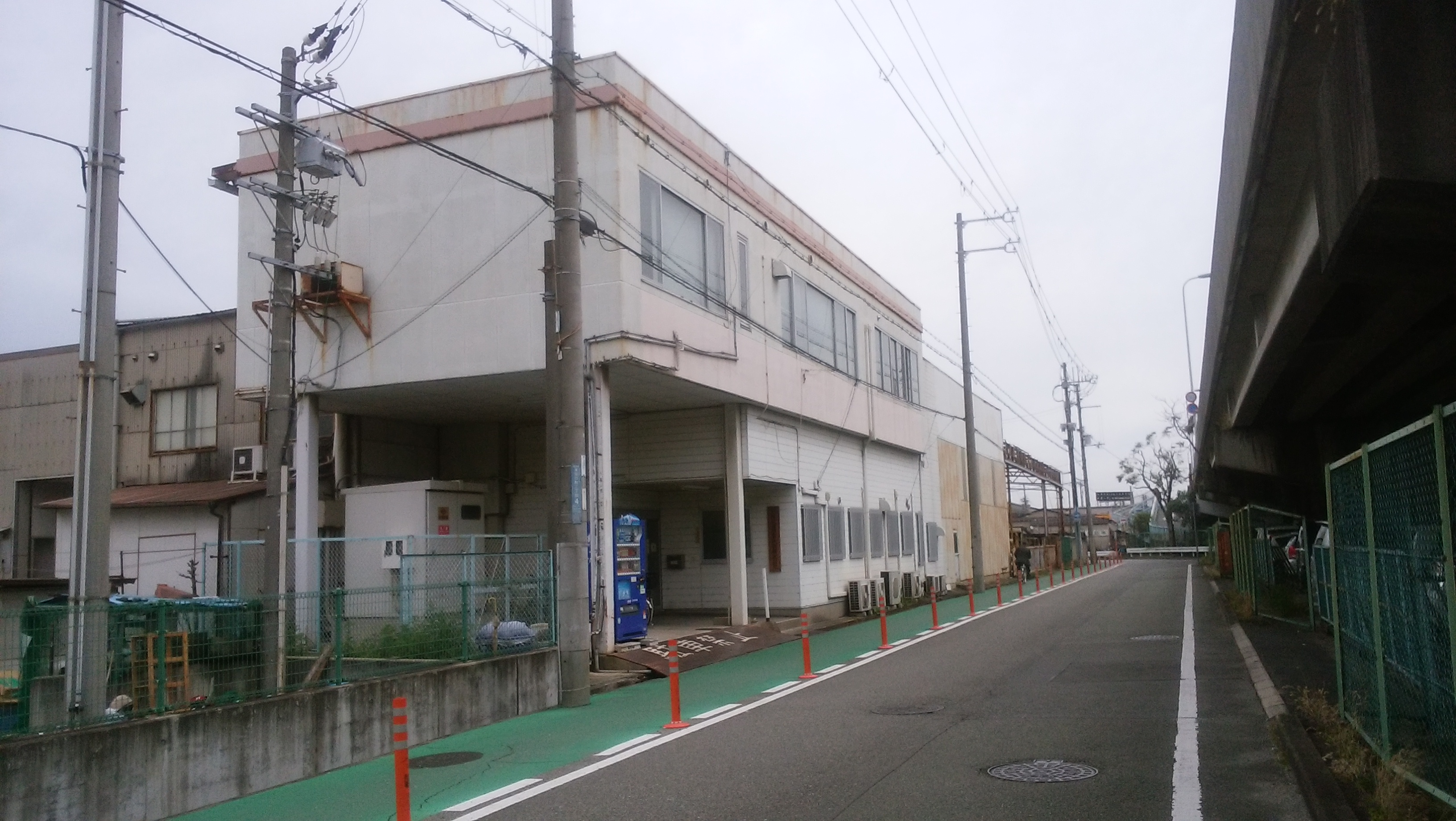 尼崎交通事業振興株式会社の本社外観